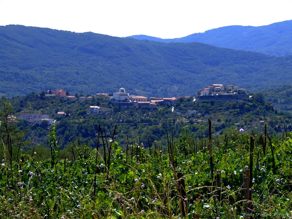 Scapoli visto da Rocchetta al Volturno